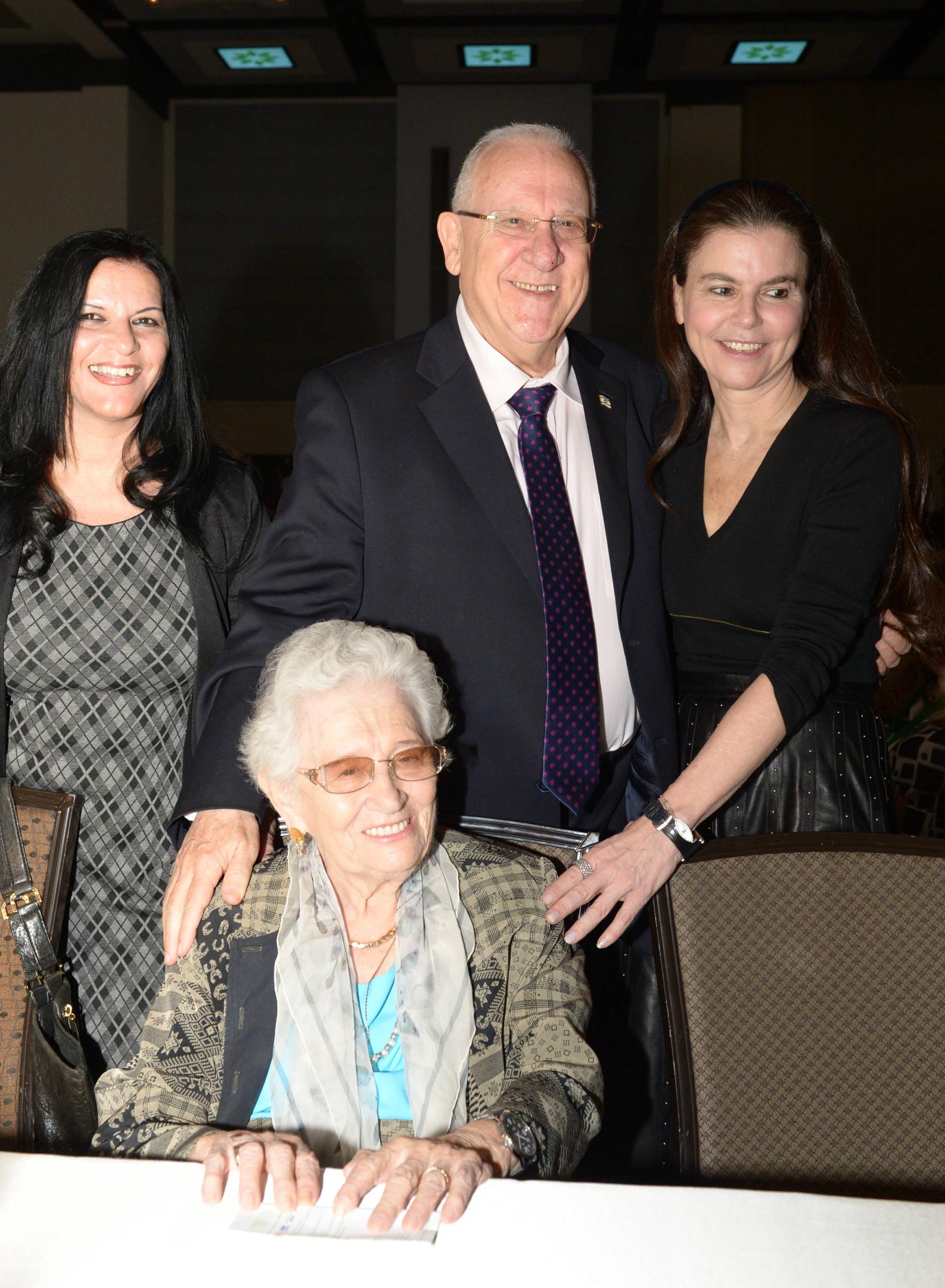 נשיא המדינה בוועידת יסמין השנתית לקידום עסקים קטנים ובינוניים העומדת בשנת 2014 בסימן עסקים בבעלות נשים כמנוע צמיחה כלכלי. עם רות דיין (יושבת) ועופרה שטראוס מימין